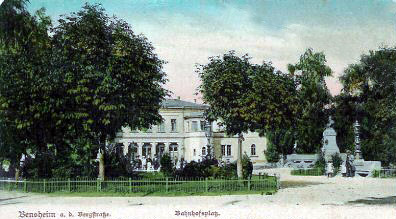 Der Bahnhof von Bensheim auf einer Postkarte aus dem Jahr 1907